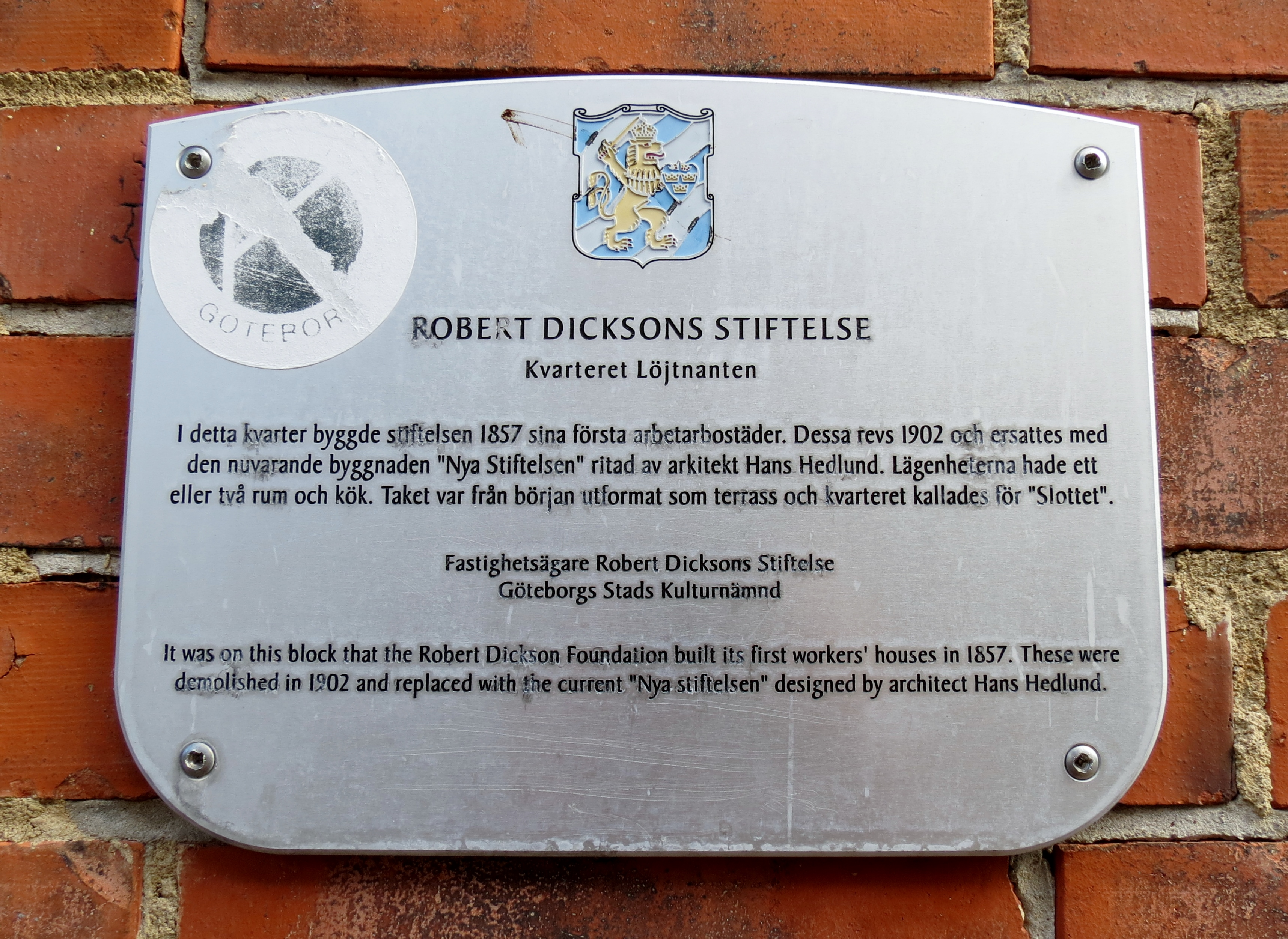 Informationsplakett vid Haga Nygata 8 med text om Kvarteret Löjtnanten och Robert Dicksons stiftelse. Plaketten sattes upp som en del av Göteborgs stads kulturnämnds "Projekt Husmärkning" omkring åren 2000–2001 där drygt hundra skyltar ingick. Se även boken "100 utmärkta hus i Göteborg". Vid en inventering av kommunen gjord 2016 satt 69 skyltar fortfarande uppe.